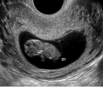 Embryon de 10 semaines.Embryo at 10 weeks.